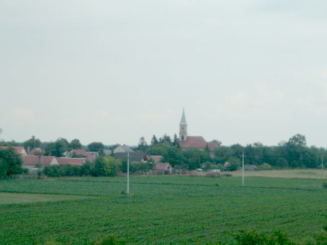 Bozzai,Hungary